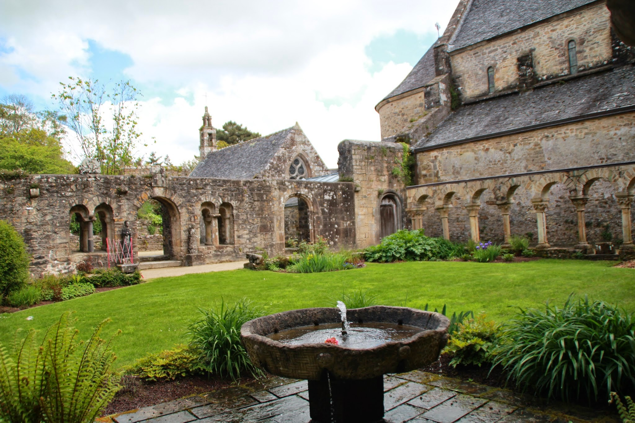 Vue du cloître de l'abbaye de Daoulas